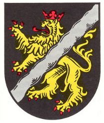 Wappen von Horschbach